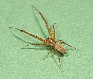 male Octonoba tanakai from Okinawa.